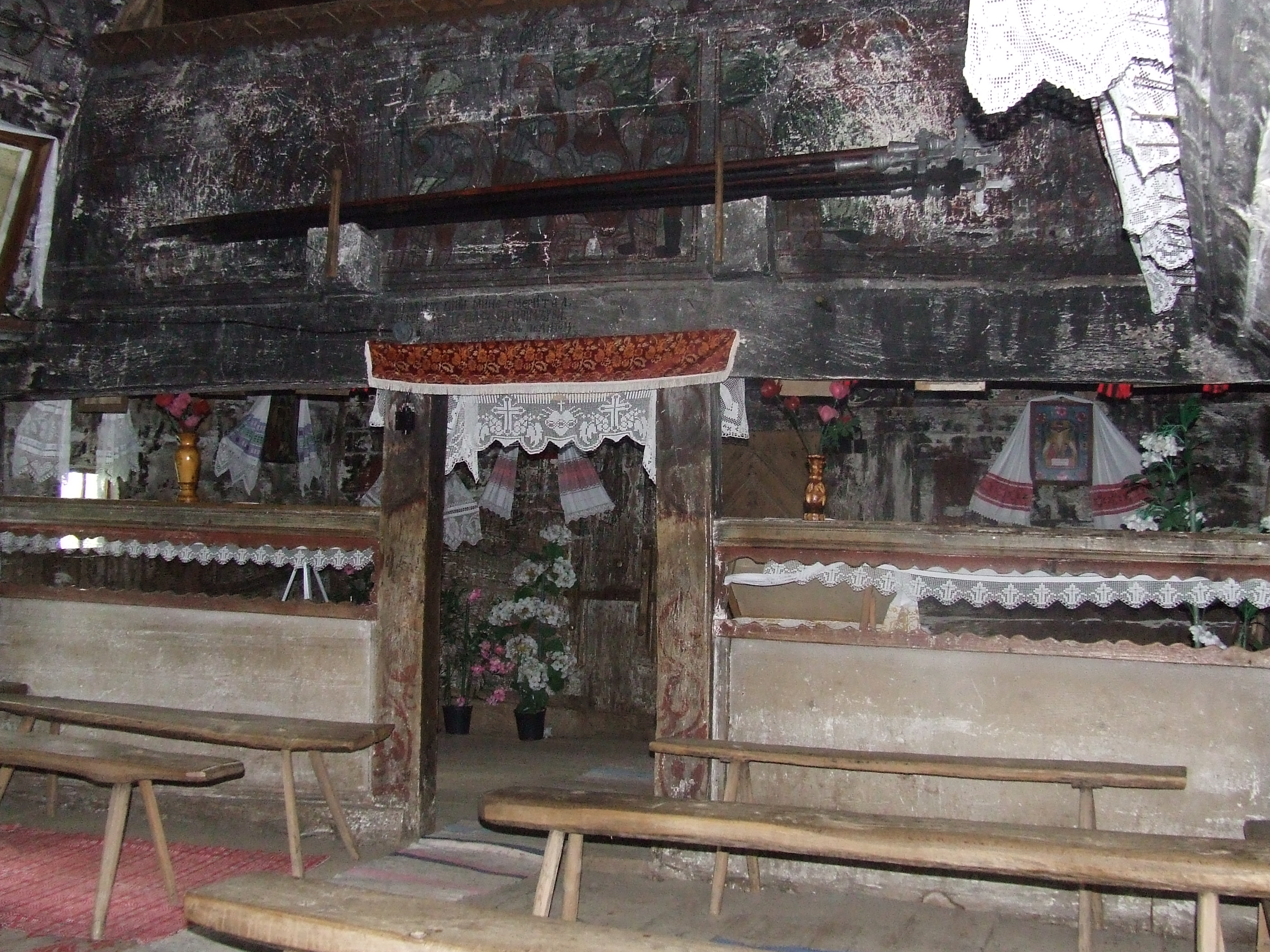 Biserica de lemn din Sânpaul. Trecerea dintre naos şi pronaos. Vedere din naos.